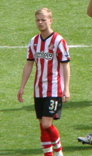 Ryan Noble